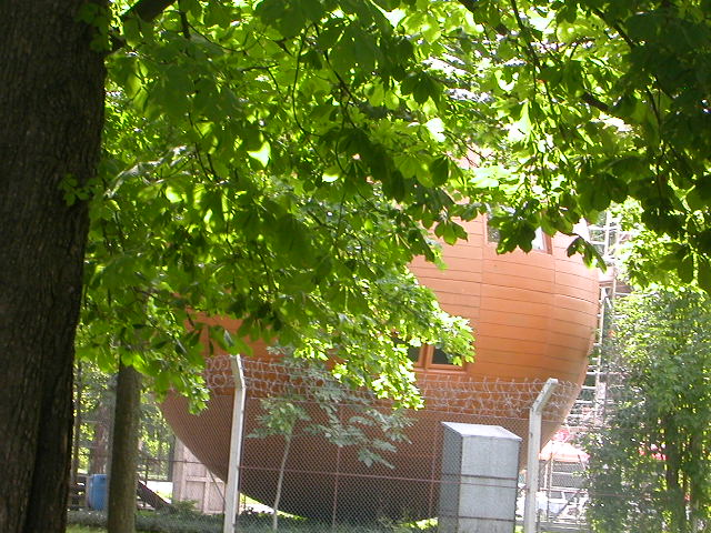 Kugelmugel1